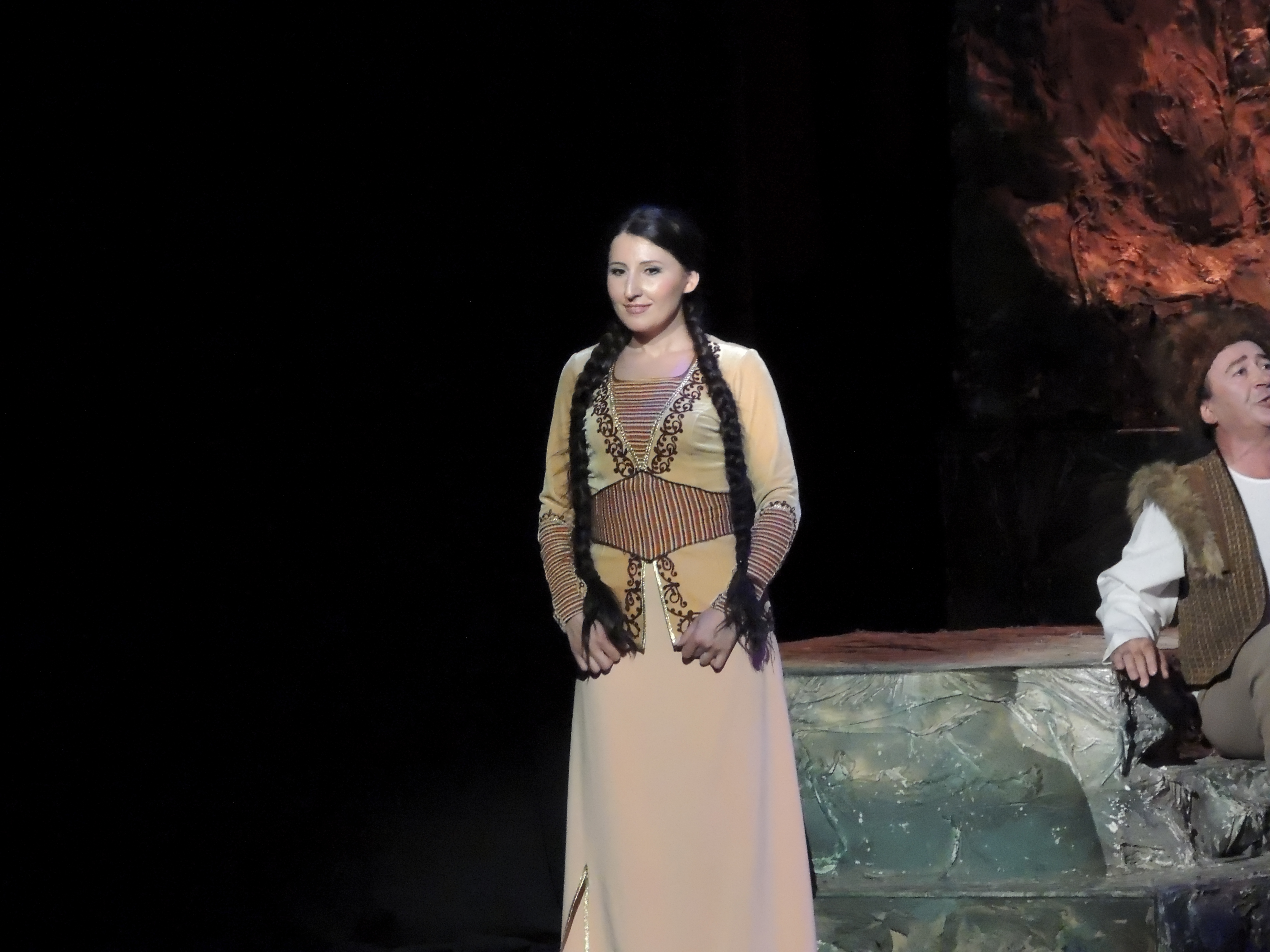 Սոֆյա Սայադյան «Անուշ» օպերայի բեմադրության ժամանակ